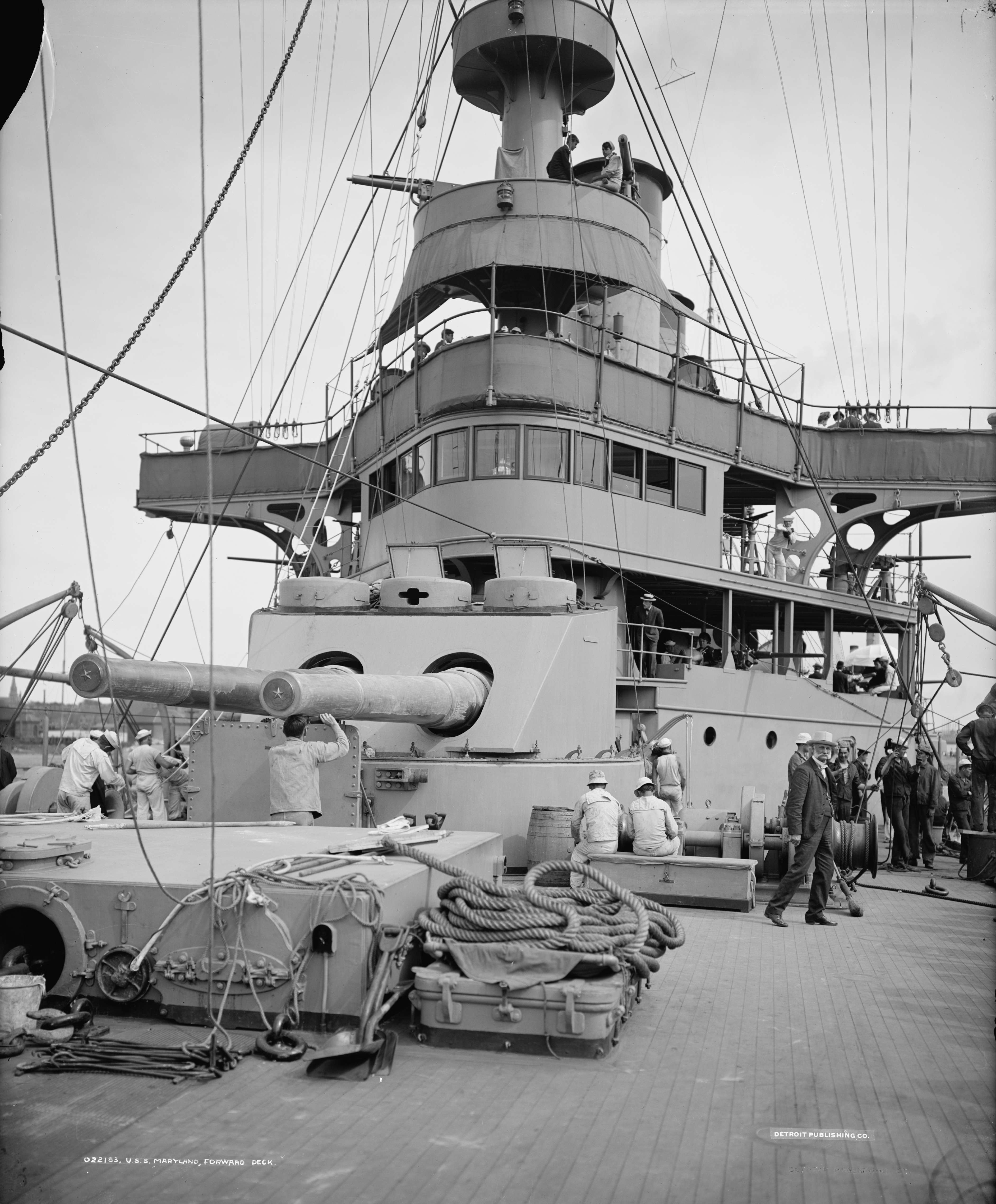 USS Maryland